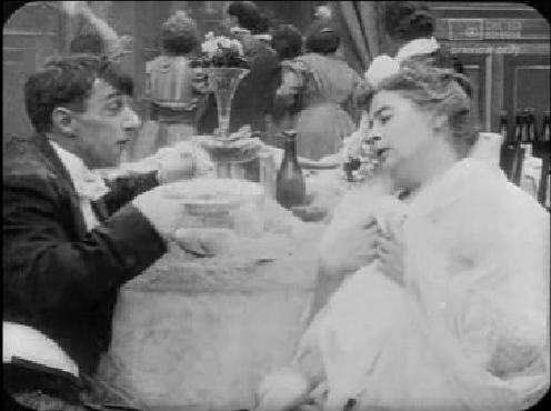 André Deed e Léonie Laporte in una scena del film La paura degli aeromobili nemici